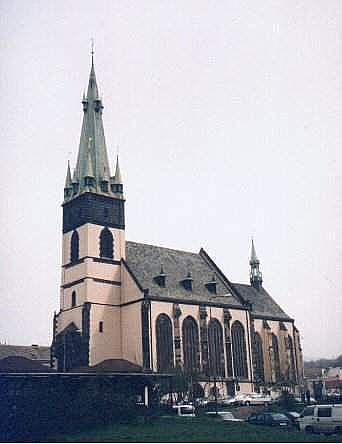 church in Ústí nad Labem